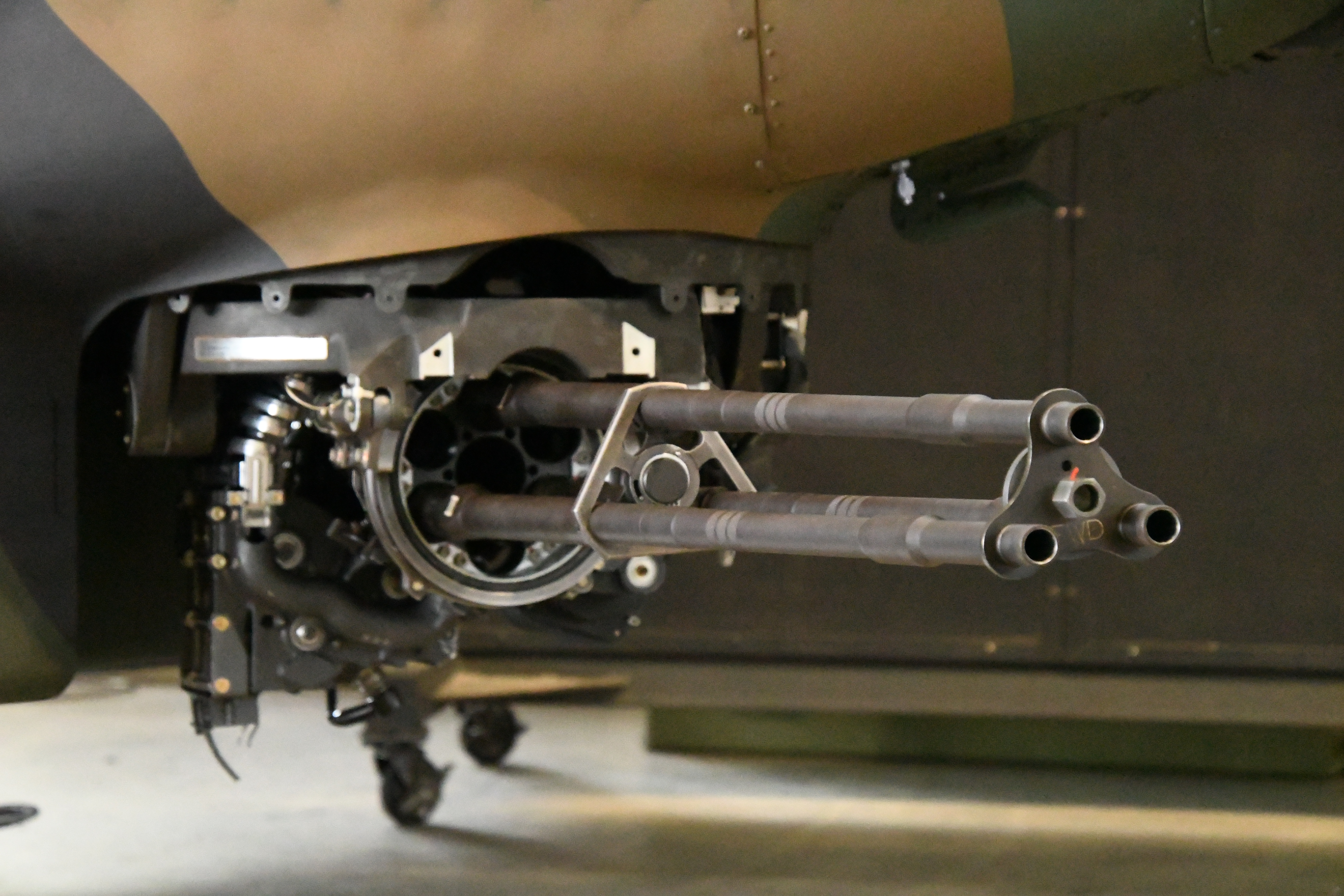 陸上自衛隊 AH-1S対戦車ヘリコプター（73482号機） 機首下部のM197機関砲。2018年11月4日 明野駐屯地にて。